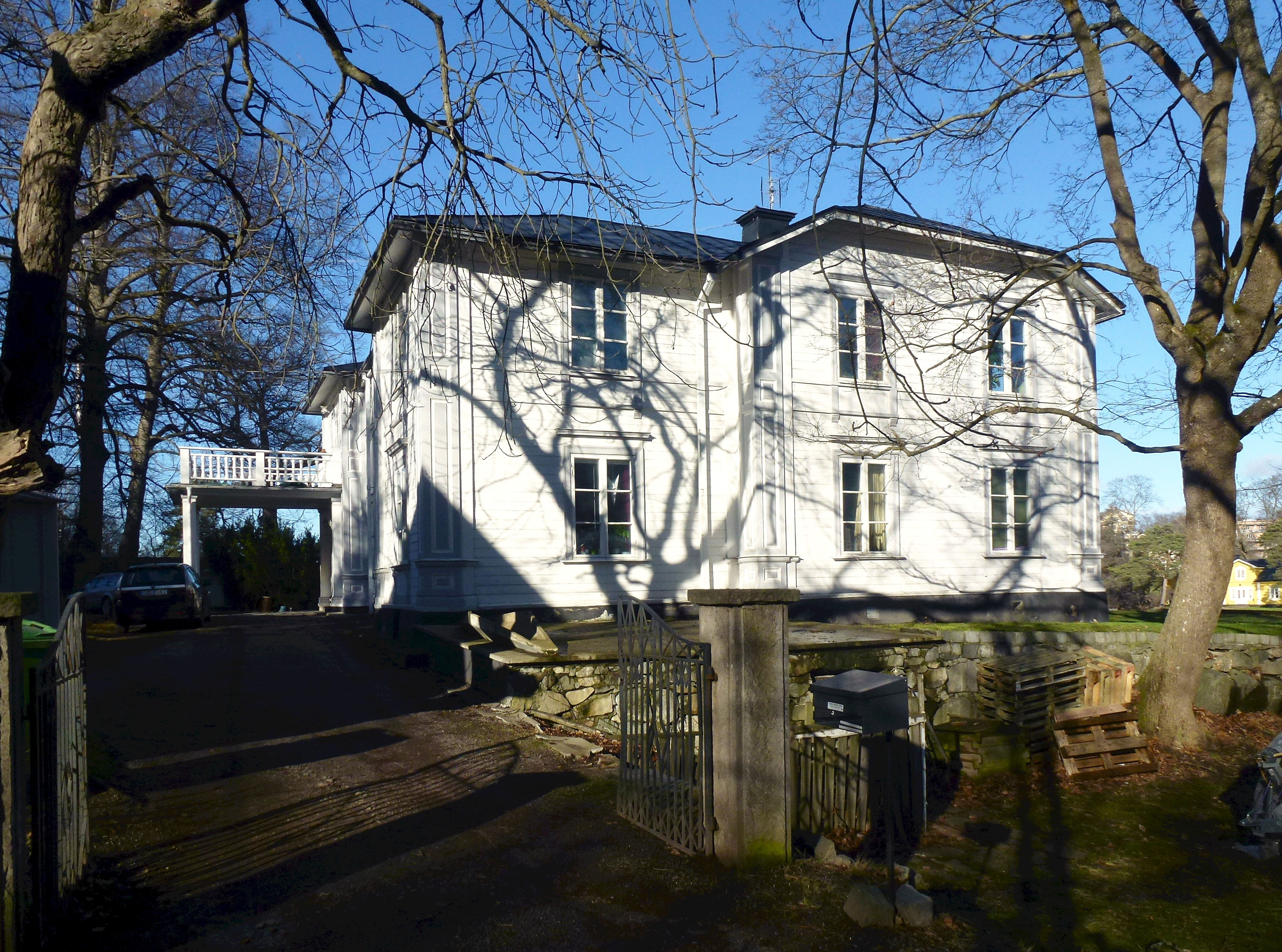 Björkhagen Alnäsvägen 1 Stocksundstorp